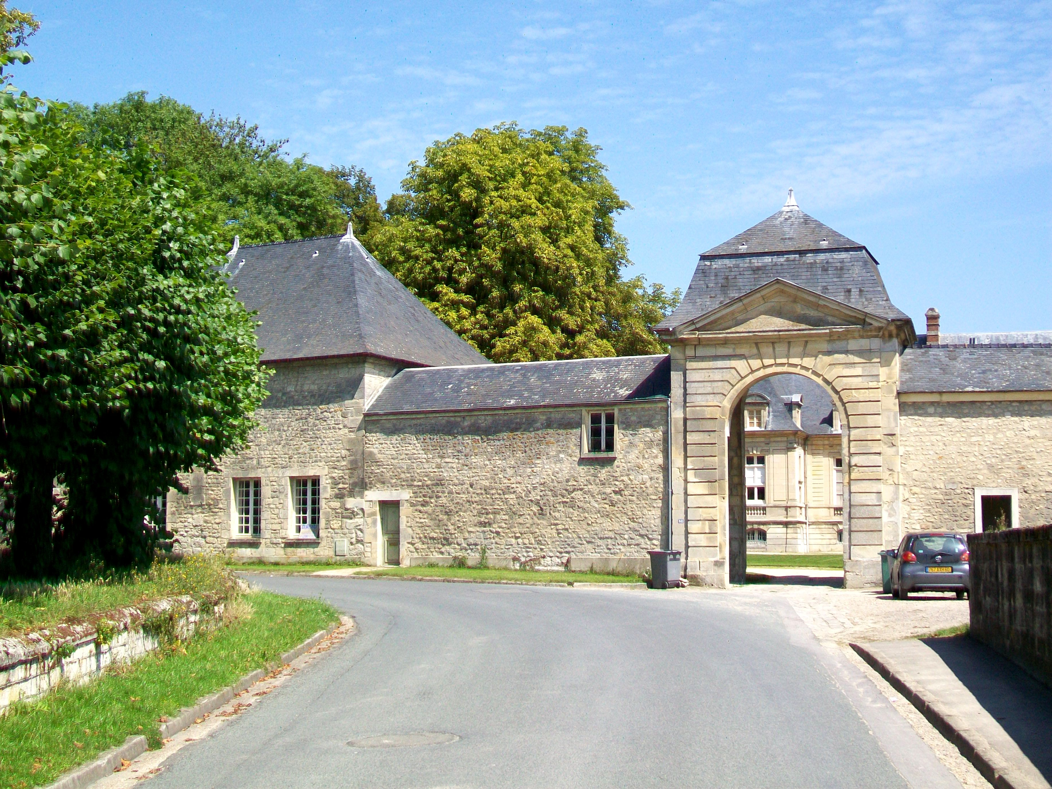 Le portail du domaine du château.